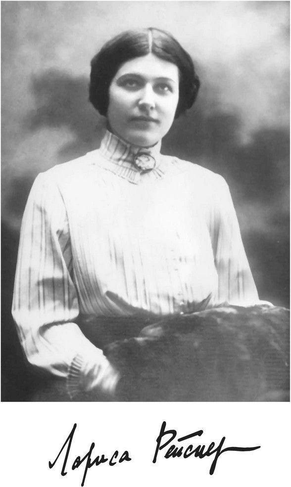 Larisa Michajlovna Rejsner (1895-1926)